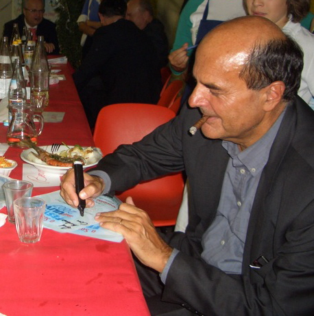 Pier Luigi Bersani alla Festa dell'Ulivo a Trieste, versione croppata di File:Pier Luigi Bersani.jpg